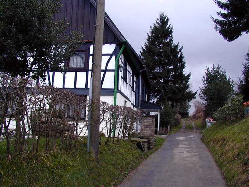 Fachwerkhaus in Eistringhausen, Radevormwald. 2002 selbst fotografiert, GFDL